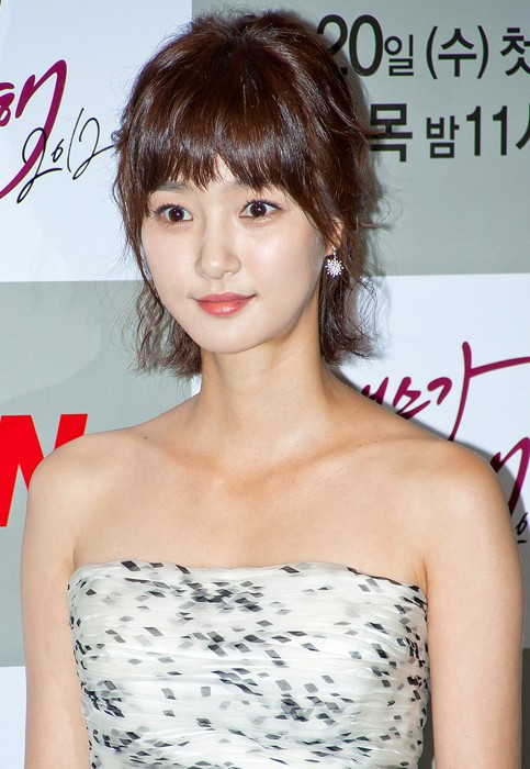 tvN 드라마 로맨스가 필요해 2012의 제작 발표회에 참석한 강예솔